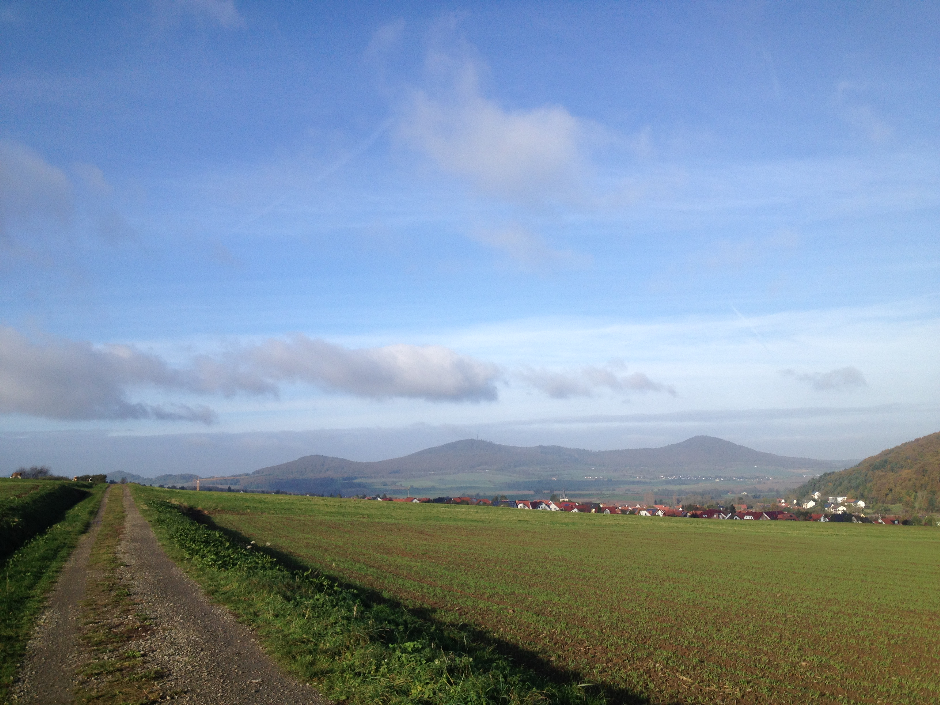 Blick vom Eco Pfad Kulturgeschichte Habichtswald über Dörnberg zum Rohrberg (links), Großen Bärenberg (mit Aussichtsturm, mitte) und den Großen Gudenberg (rechts). Ganz rechts der Südhang des Hohen Dörnberges